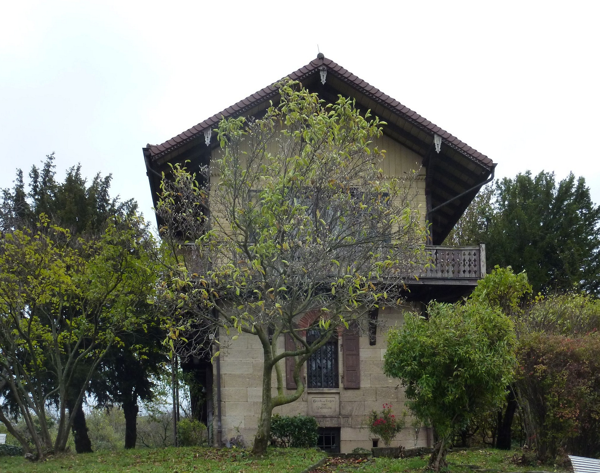 Landhaus Weiß